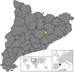 Localització de Moià. Location of Moià in Catalonia.